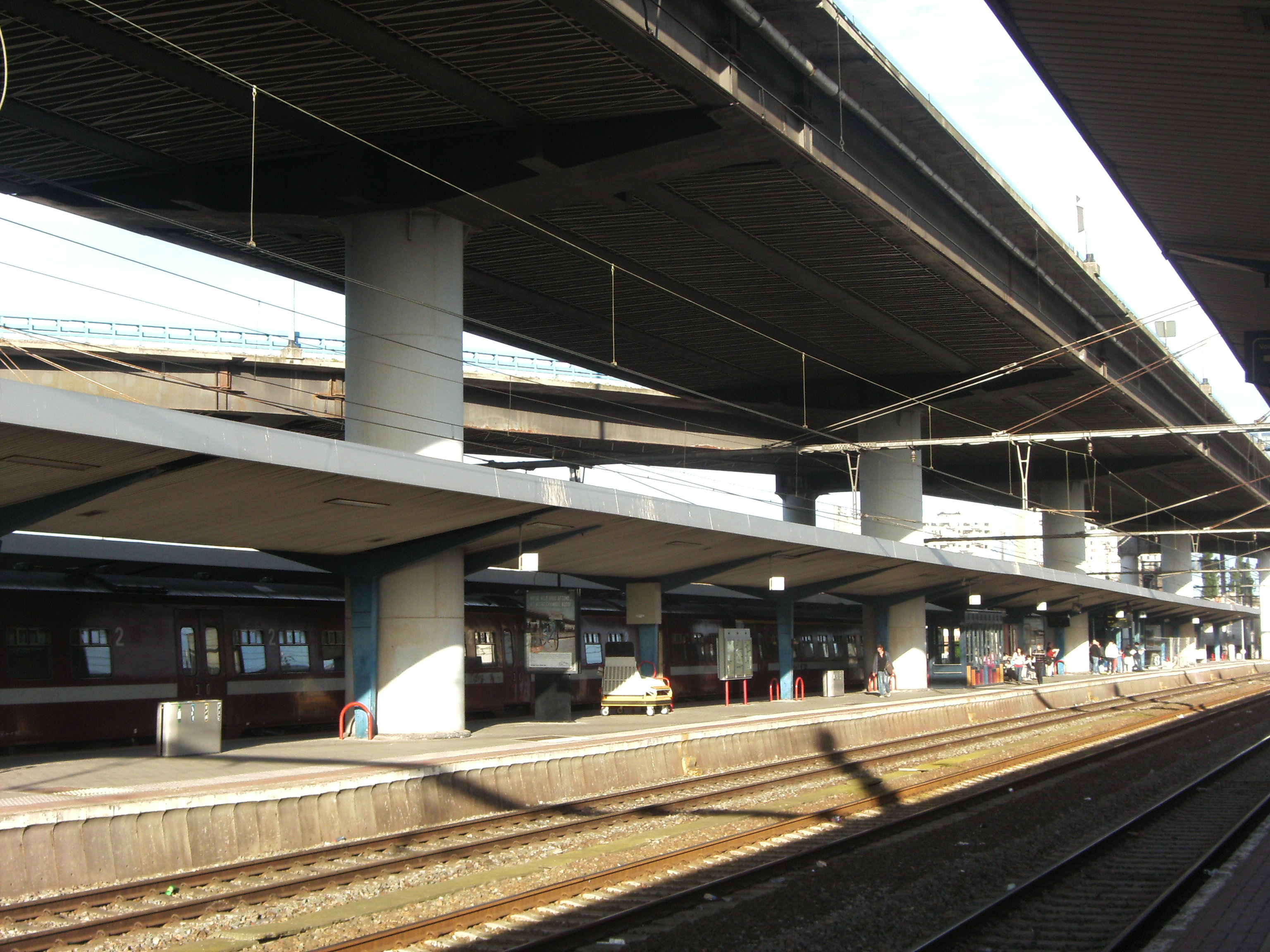 Gare de Charleroi-Sud (Belgique) - quai des voies 9 et 10 surplombé par le ring R9.